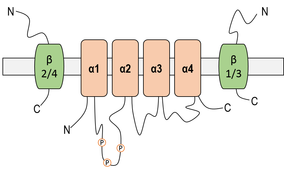 Vue schématique du canal sodique la sous unité alpha en 4 domaines qui constituent le pore central du canal et les 2 sous unités béta